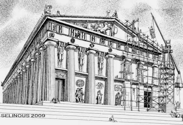 Selinous, opera propria,10/2009 Ricostruzione del Tempio di Giove Olimpico ad Agrigento